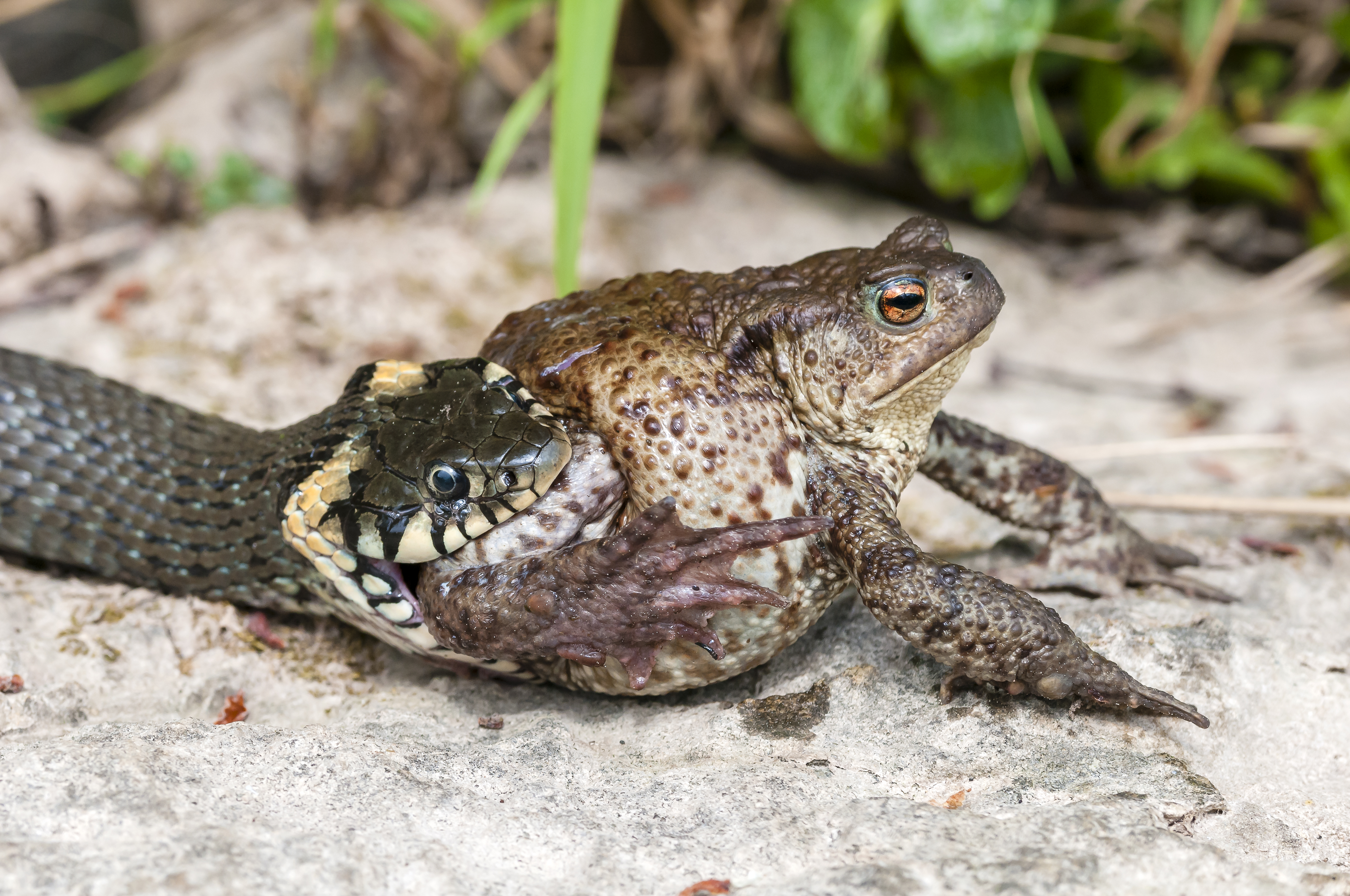 Обыкновенный уж[1] (лат. Natrix natrix). Внешне обыкновенные ужи обычно легко отличаются от других змей «жёлтыми ушами» — ярко выраженными отметинами на голове, чаще жёлтыми, но иногда белыми и оранжевыми. В редких случаях отметины могут быть слабо выражены или отсутствовать. Самки по размеру больше самцов, иногда достигают до 1,5 метров, но чаще всего — не больше метра. Питается в основном живыми лягушками, грызунами и реже рыбой. Врагами ужей являются аисты, хищные птицы и некоторые млекопитающие.